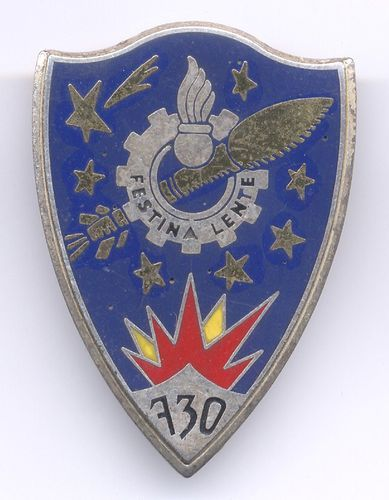 Insigne de la 730e Cie Munitions.